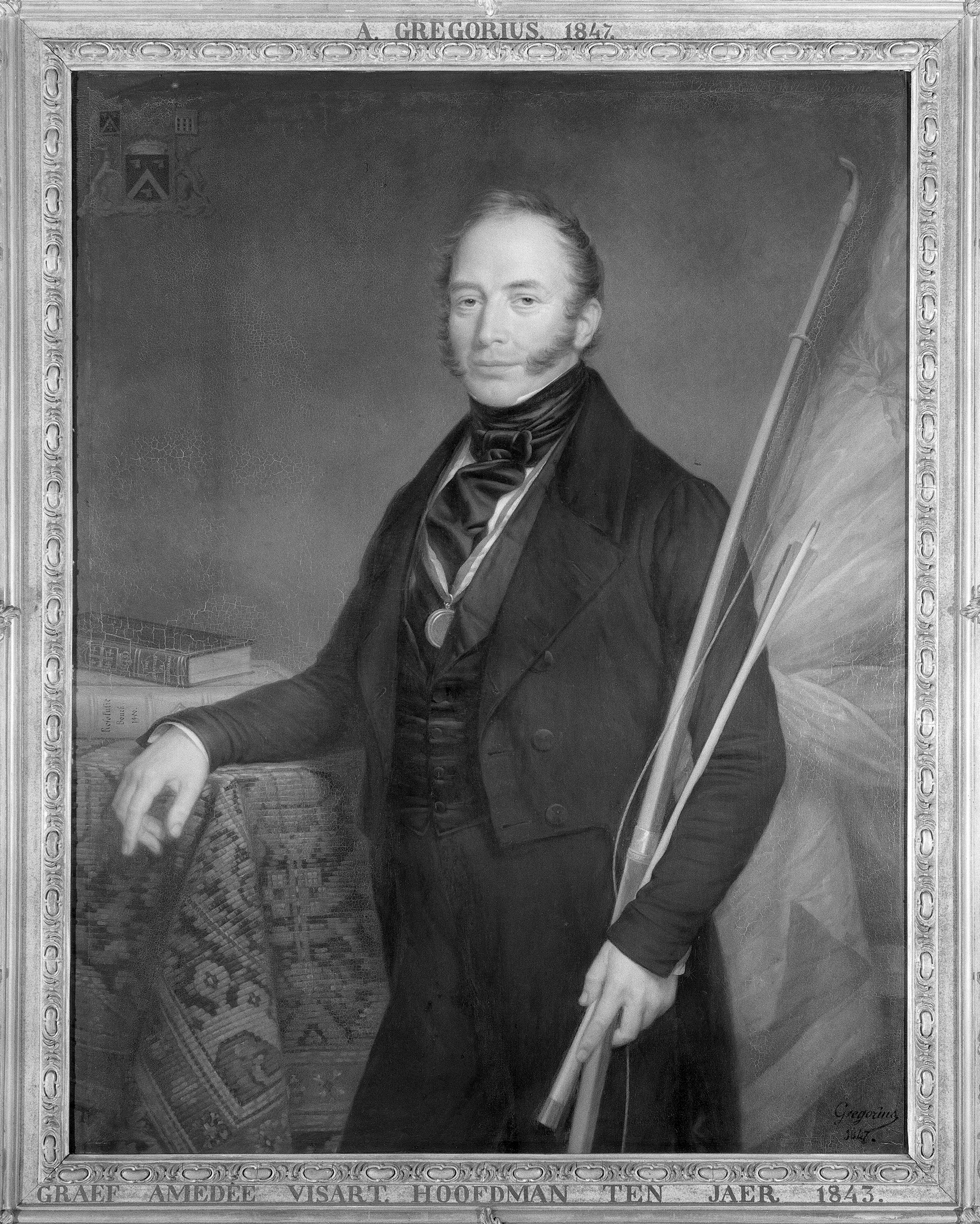 Amedeus Visart